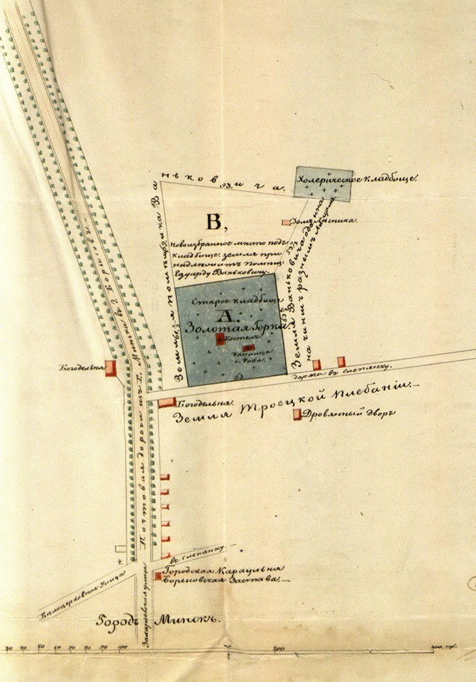 План могілак на Залатой Горцы, 1861 год.